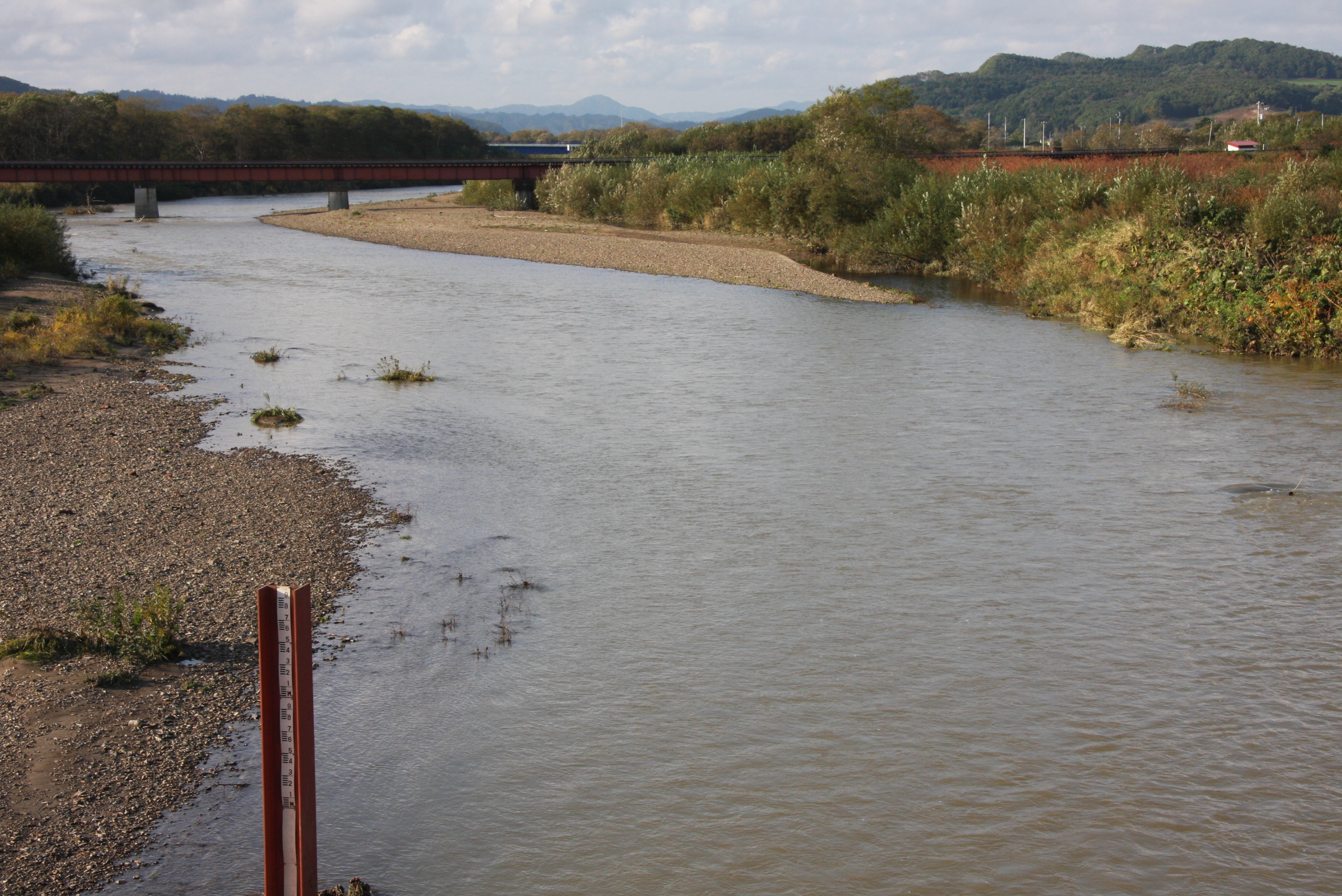 庶路川 庶路橋上流